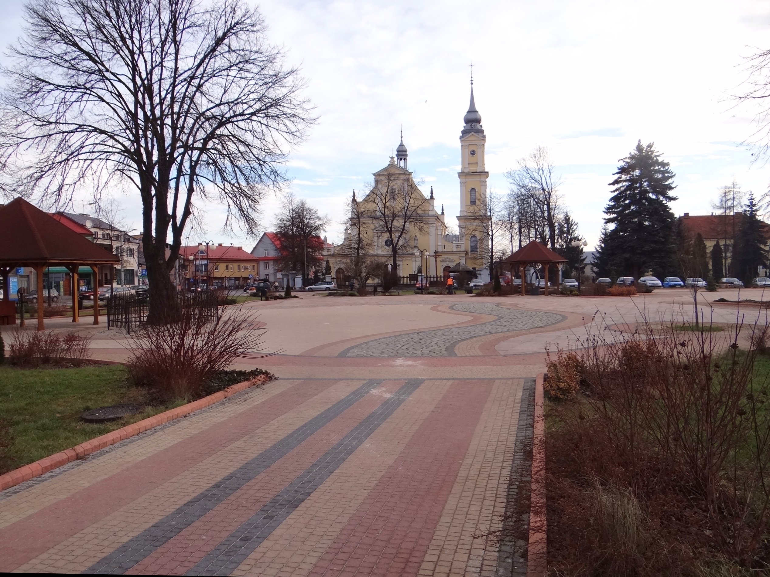 Rynek w Szczucinie